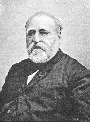 Henri Baudrillart par Eugène Pirou